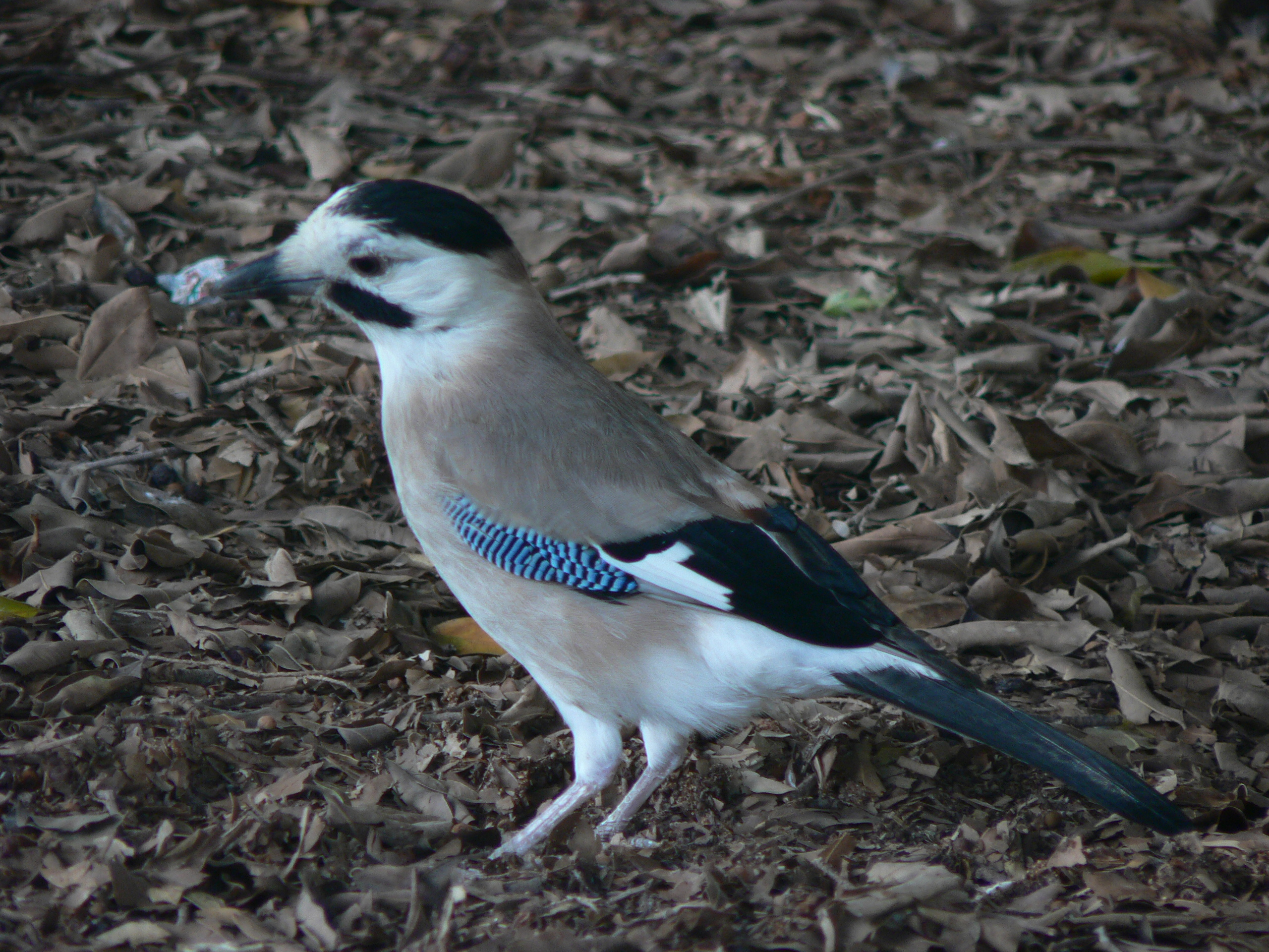 Garrulus Orvani עורבני